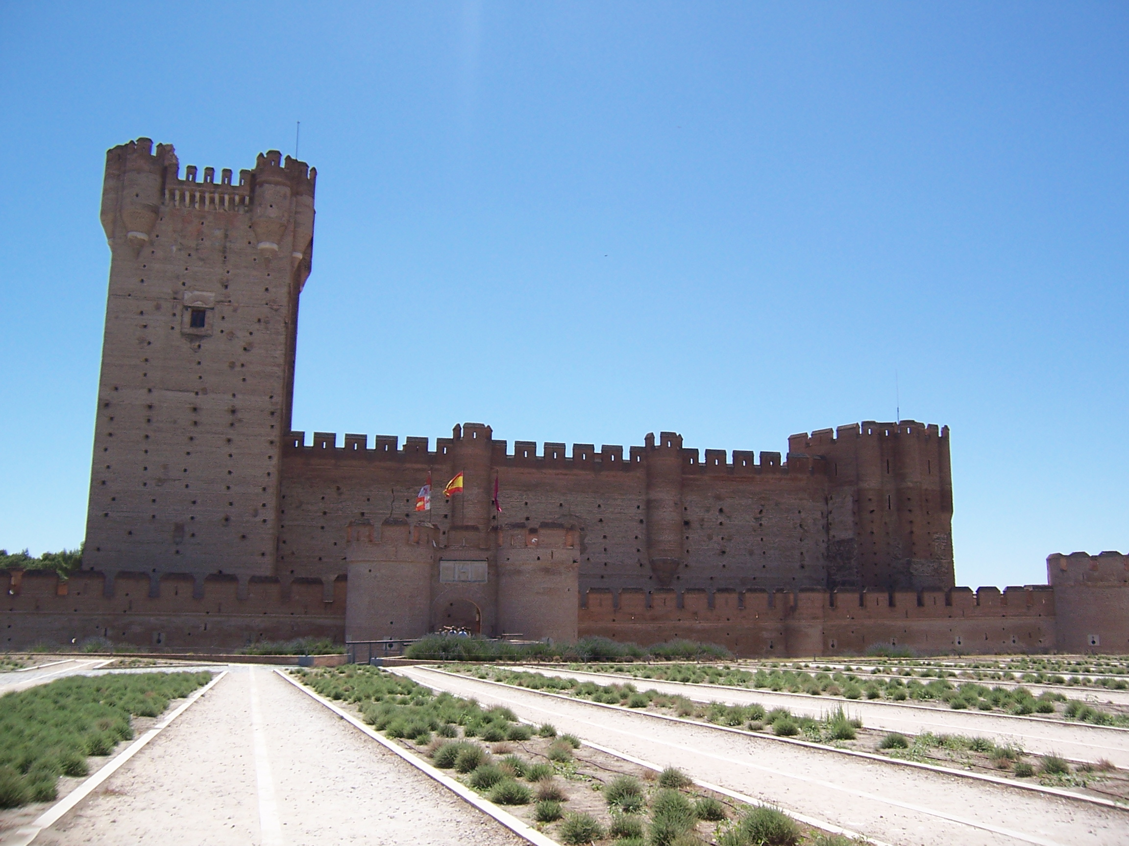 Castillo de la Mota en Medina del Campo, provincia de Valladolid